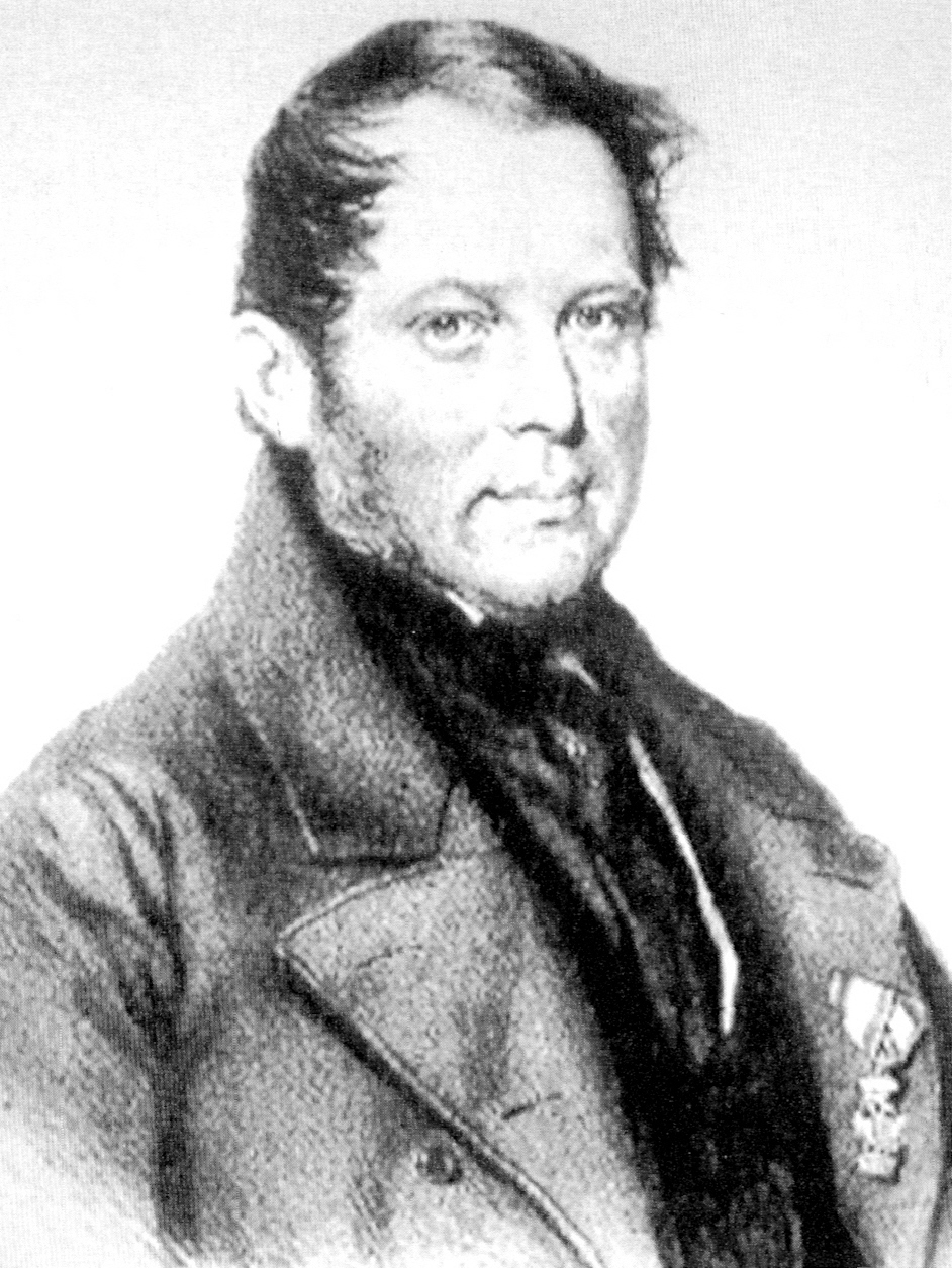 Josef Dierzer von Traunthal - Bürgermeister von Linz 1854-1856.